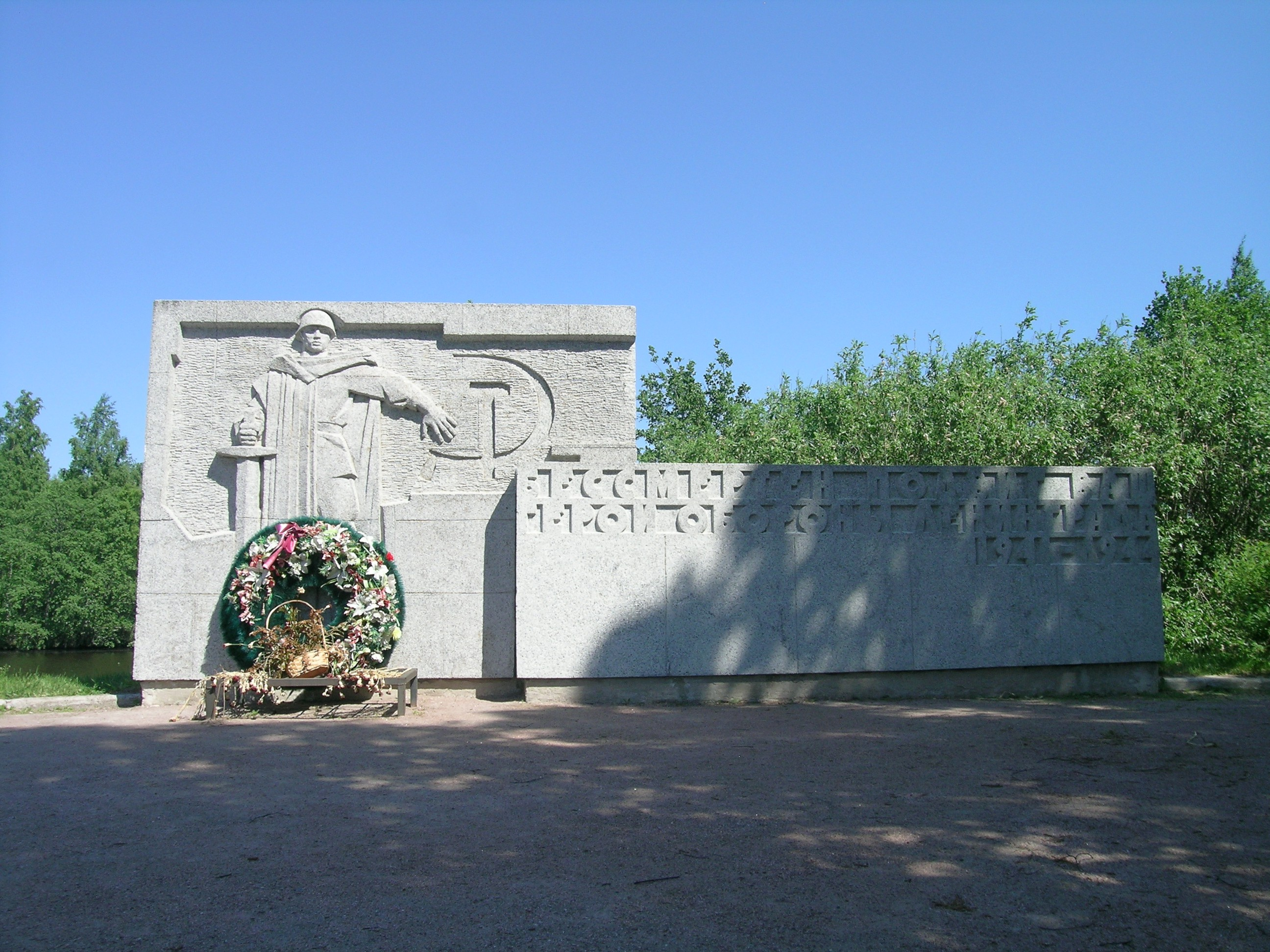 Мемориал Бессмертен подвиг Ваш герои обороны Ленинграда 1941—1944